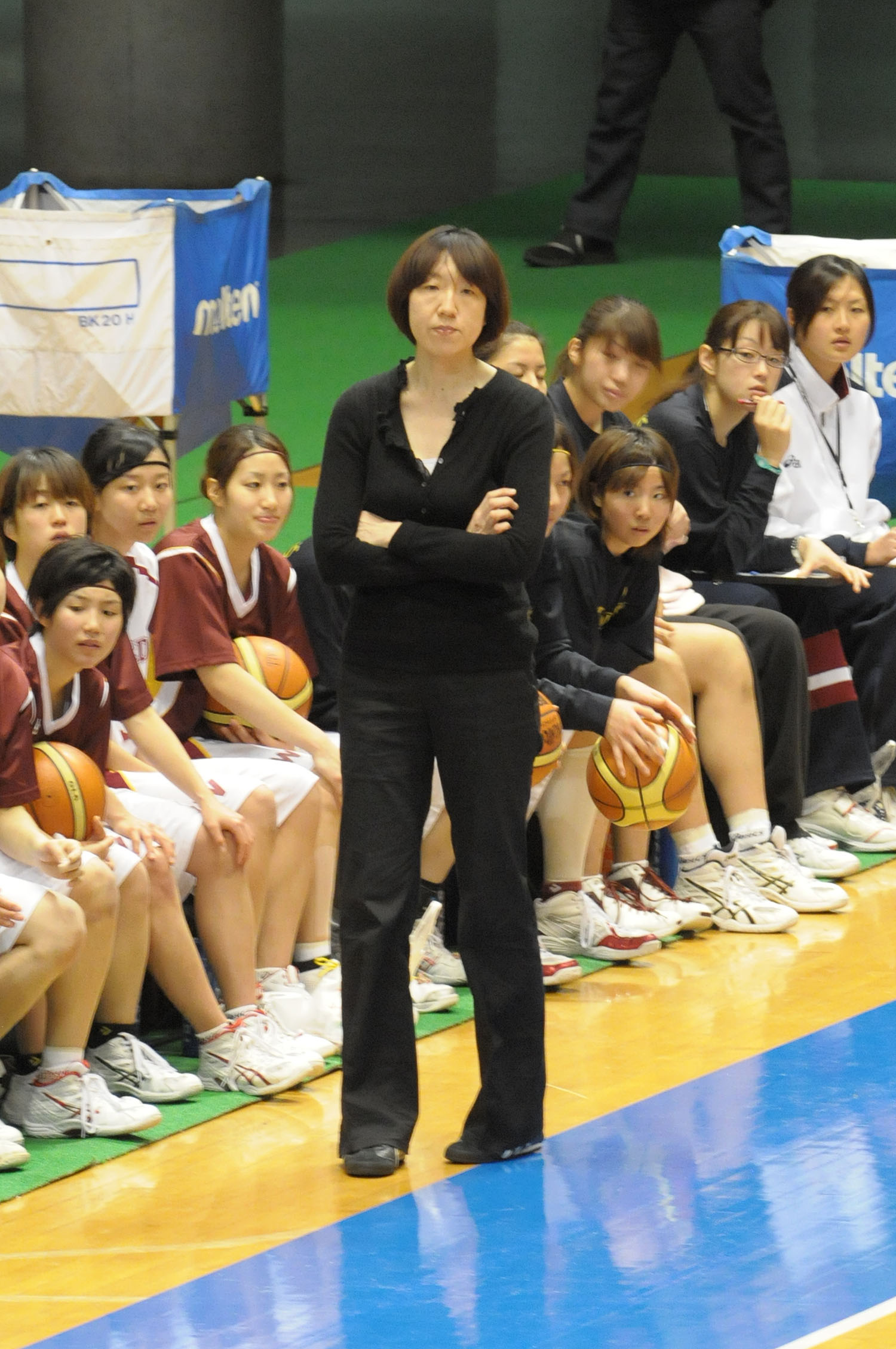 早稲田大学、萩原美樹子ヘッドコーチ。東京体育館で。